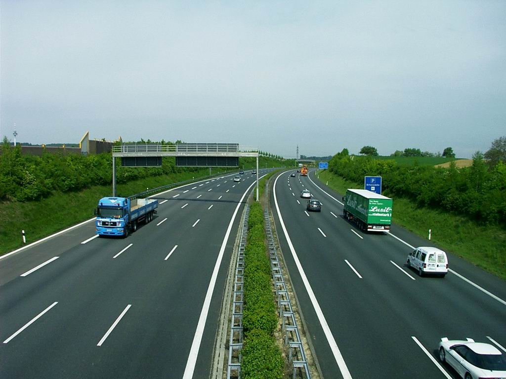 Blick von einer Autobahnüberführung bei Karlsruhe-Palmbach auf die A8 in Richtung Dreieck Karlsruhe.